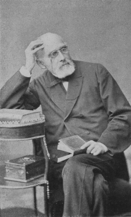 Hornjoserbsce: Fotografija Jana Arnošta Smolerja; serbski filolog, spisowaćel a nakładnik.